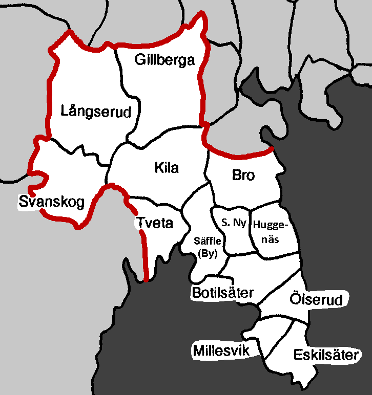 old municipalities